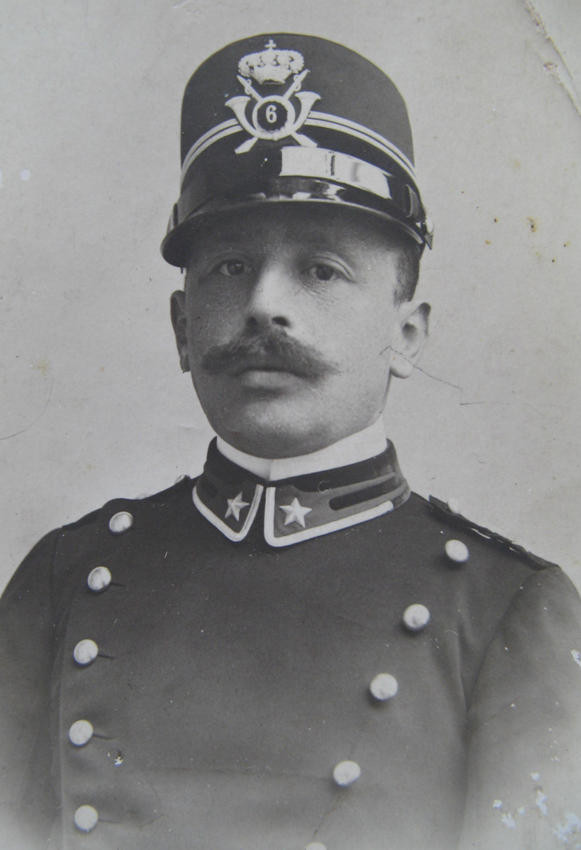 Luigi Sapienza - Archivio dell'Ufficio Storico dello Stato Maggiore dell'Esercito